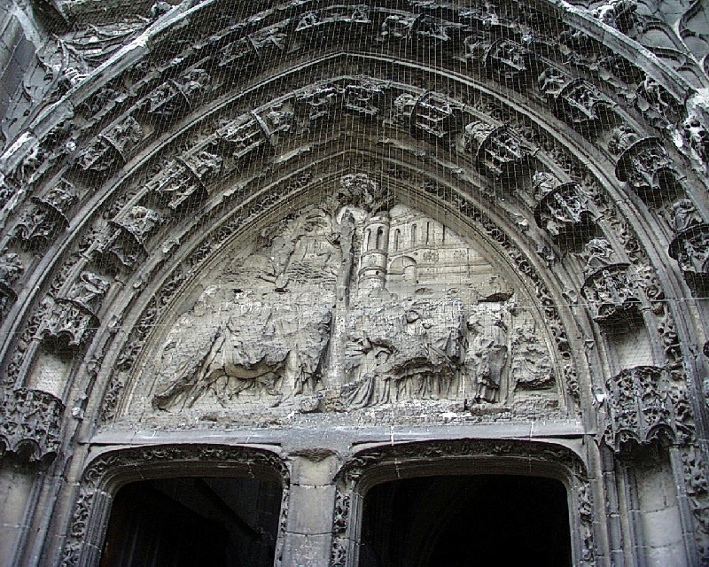 Bilder aus Dreux